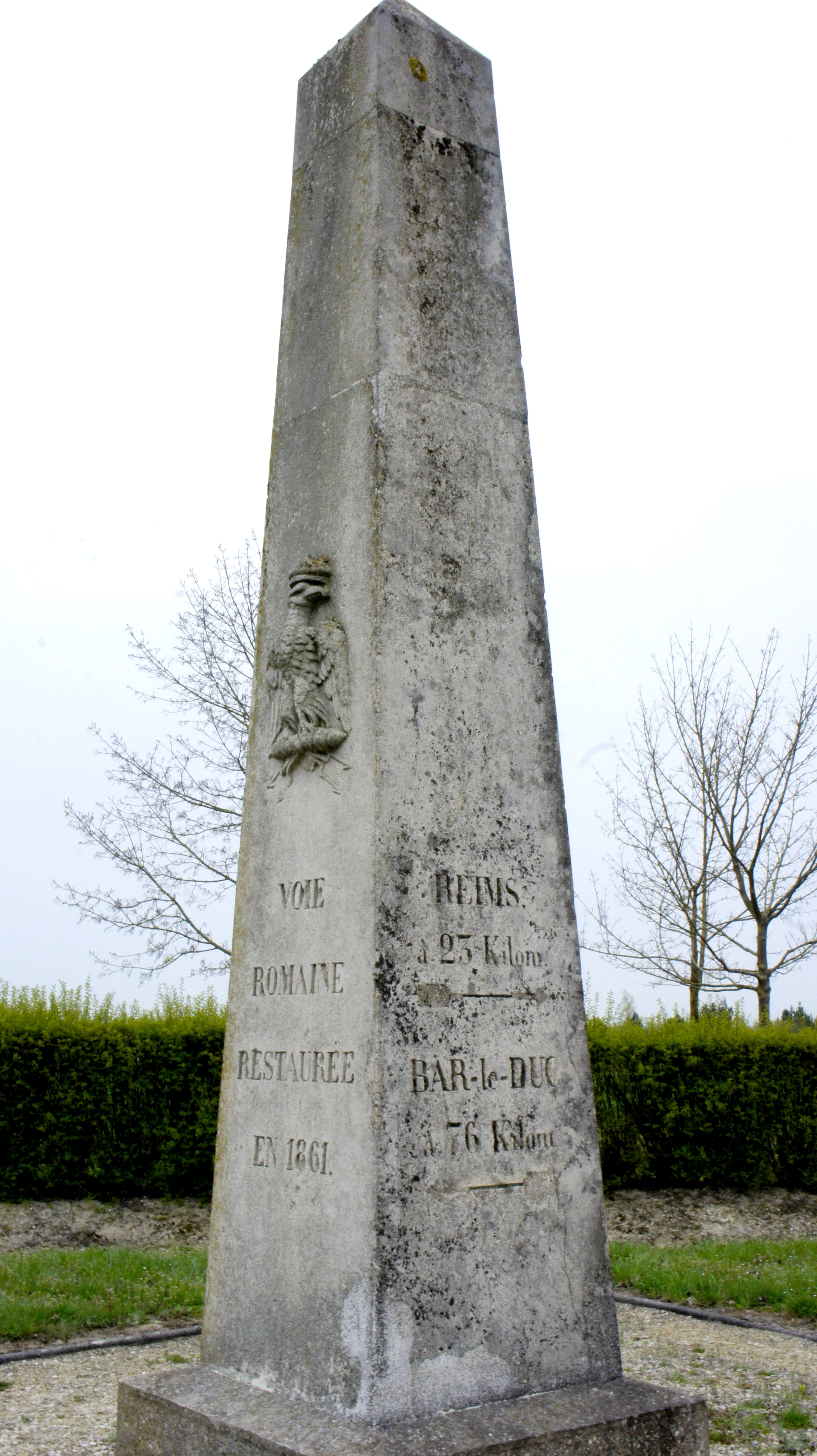 Monument élevé par Napoléon III pour marquer l'ancien tracé de la voie romaine, détruit lors de la Première Guerre mondiale puis relevé. Il se trouve sur le territoire de la commune de Sept-Saulx, au bord de la D35, en limite avec Mourmelon-le-Petit et Baconnes.